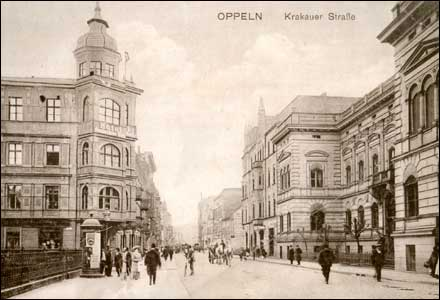 Widok ul. Krakowskiej od strony dworca, z lewej Hotel "Deutsches Haus", ok. 1917 r. (wyd. Georg Stilke, Berlin)